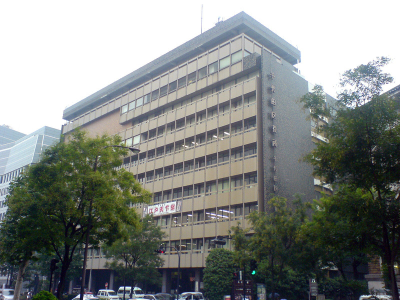 東京都千代田区にあった旧千代田区役所庁舎。2007年に現庁舎に移転後、解体。